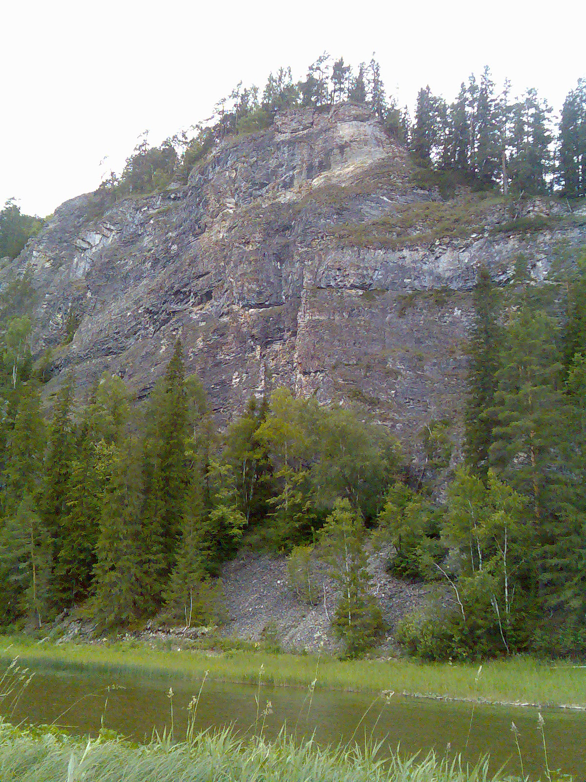 Скала